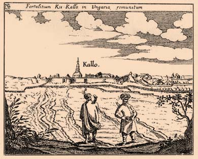 Kálló vára a 17. században